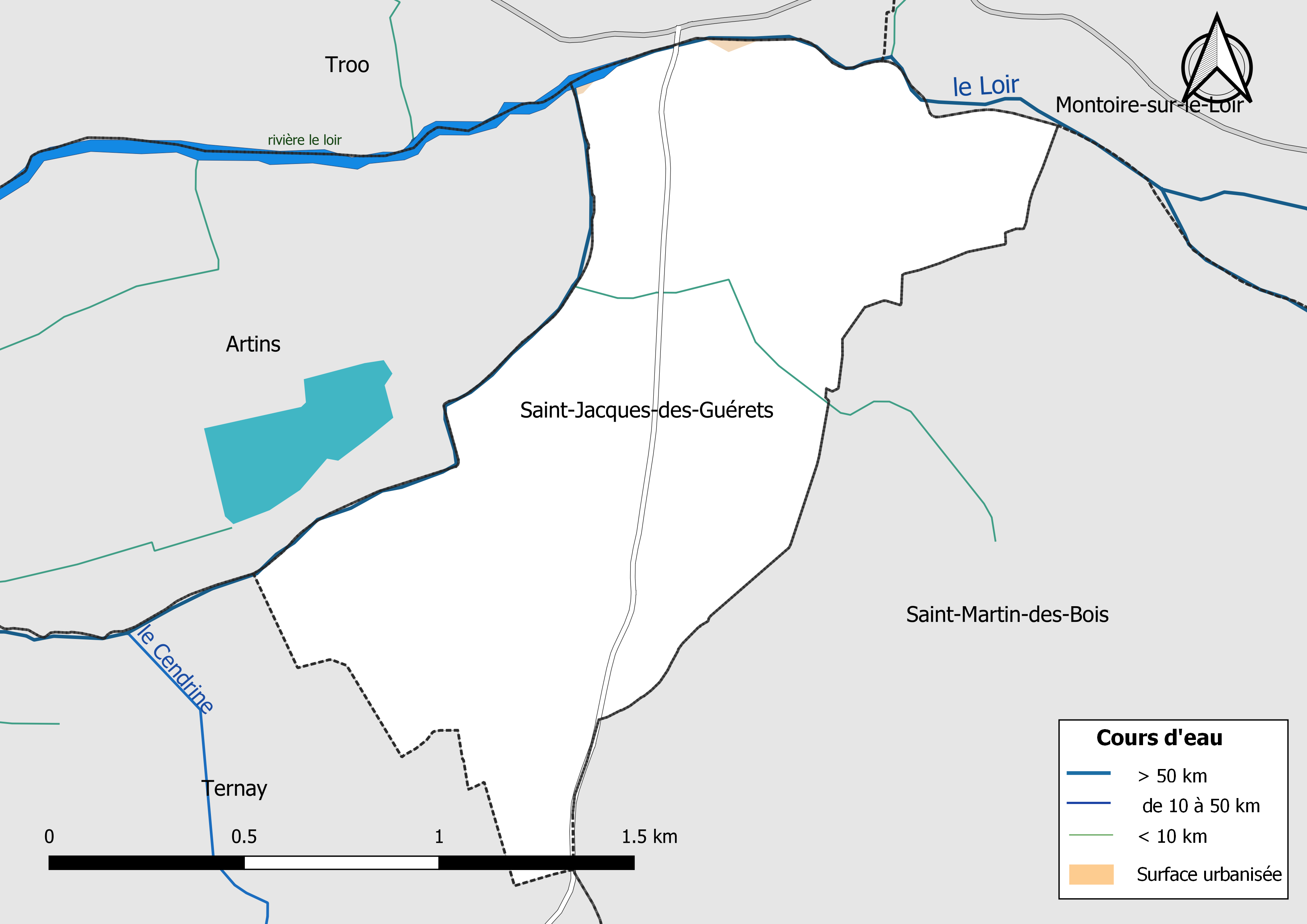 Carte du réseau hydrographique de la commune de Saint-Jacques-des-Guérets (Loir-et-Cher, France).